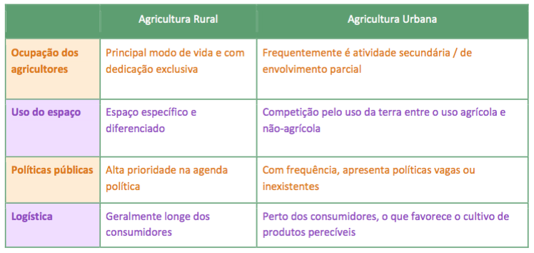 Tabela com pontos de diferenciação entre agriculturas rural e urbana